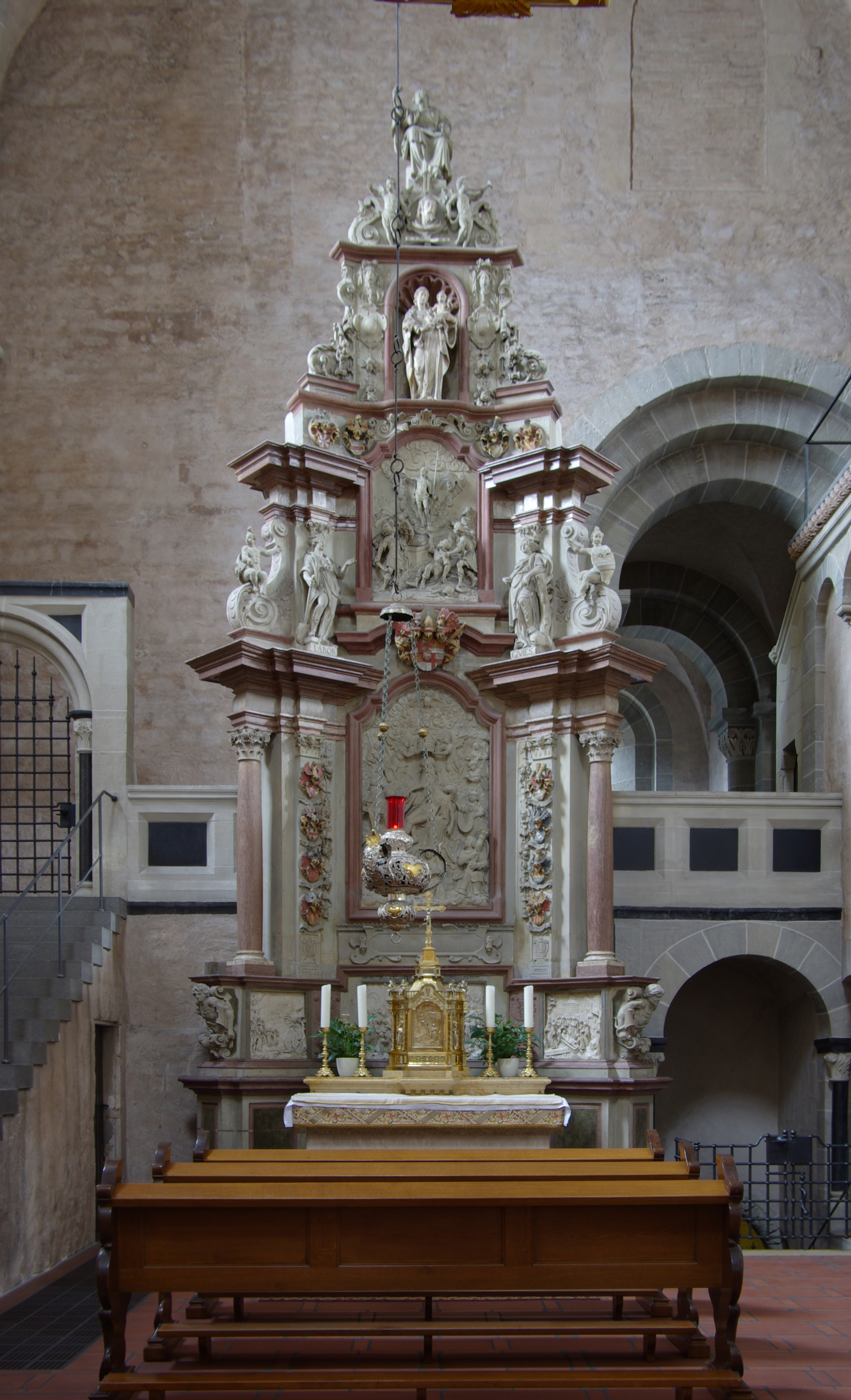 Trierer Dom, linkes Seitenschiff, Dreifaltigkeitsaltar